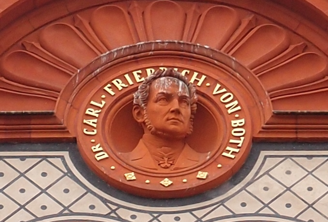 Relief-Portrait des Juristen Carl Friedrich von Both (1789-1875) an der Fassade der Universität Rostock.